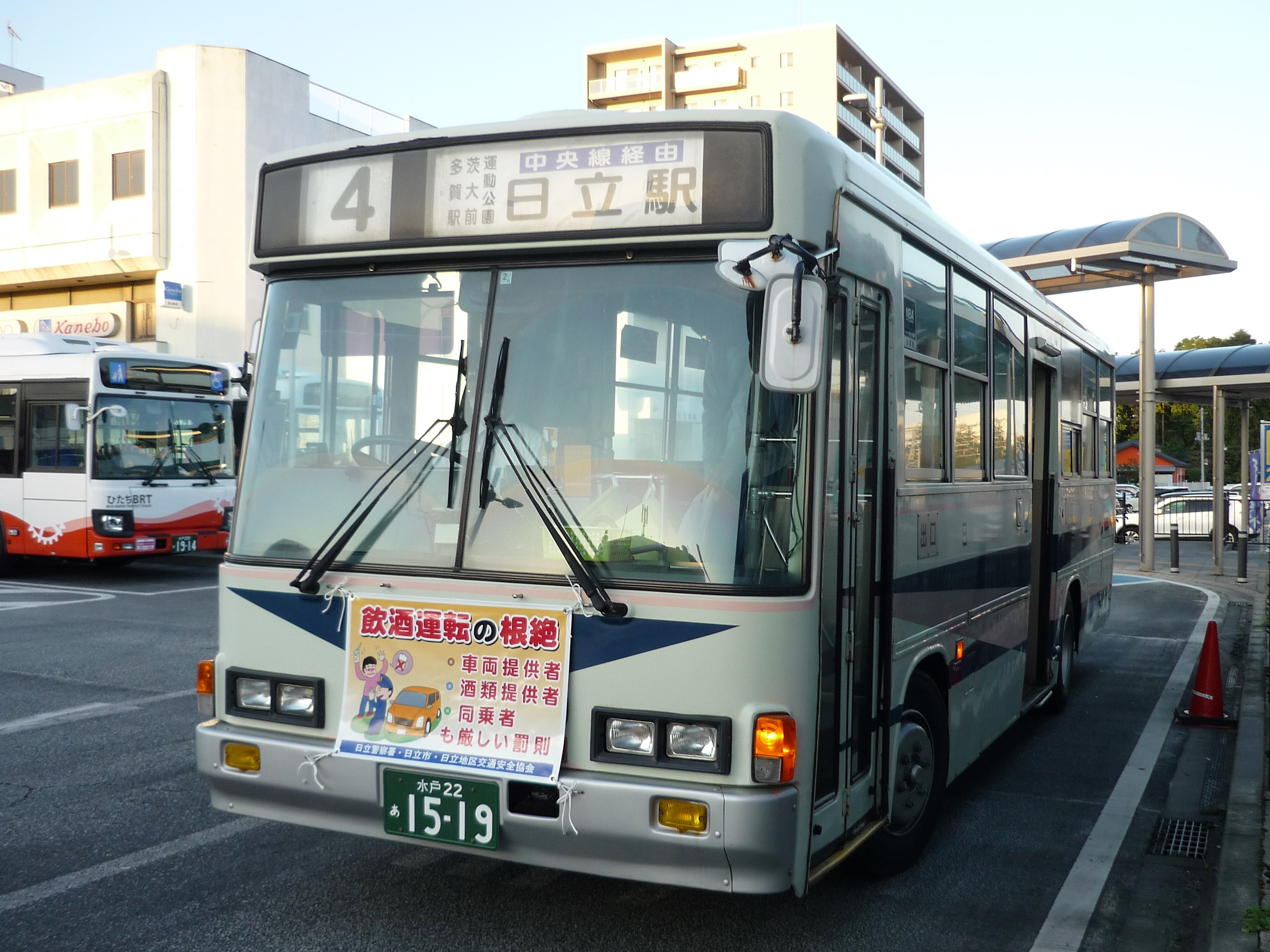 常陸多賀駅前に停車中の日立電鉄交通サービスのバス Panasonic Lumix DMC-FS3